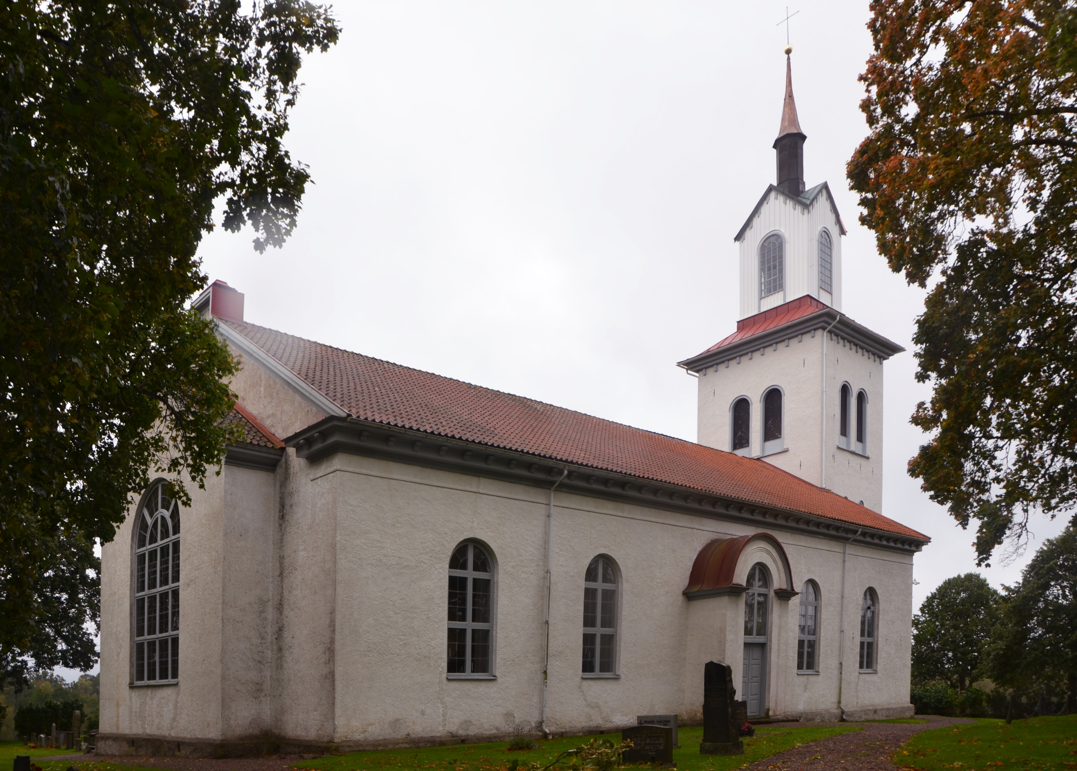 Kirche von Kölingared, Ulricehamns kommun